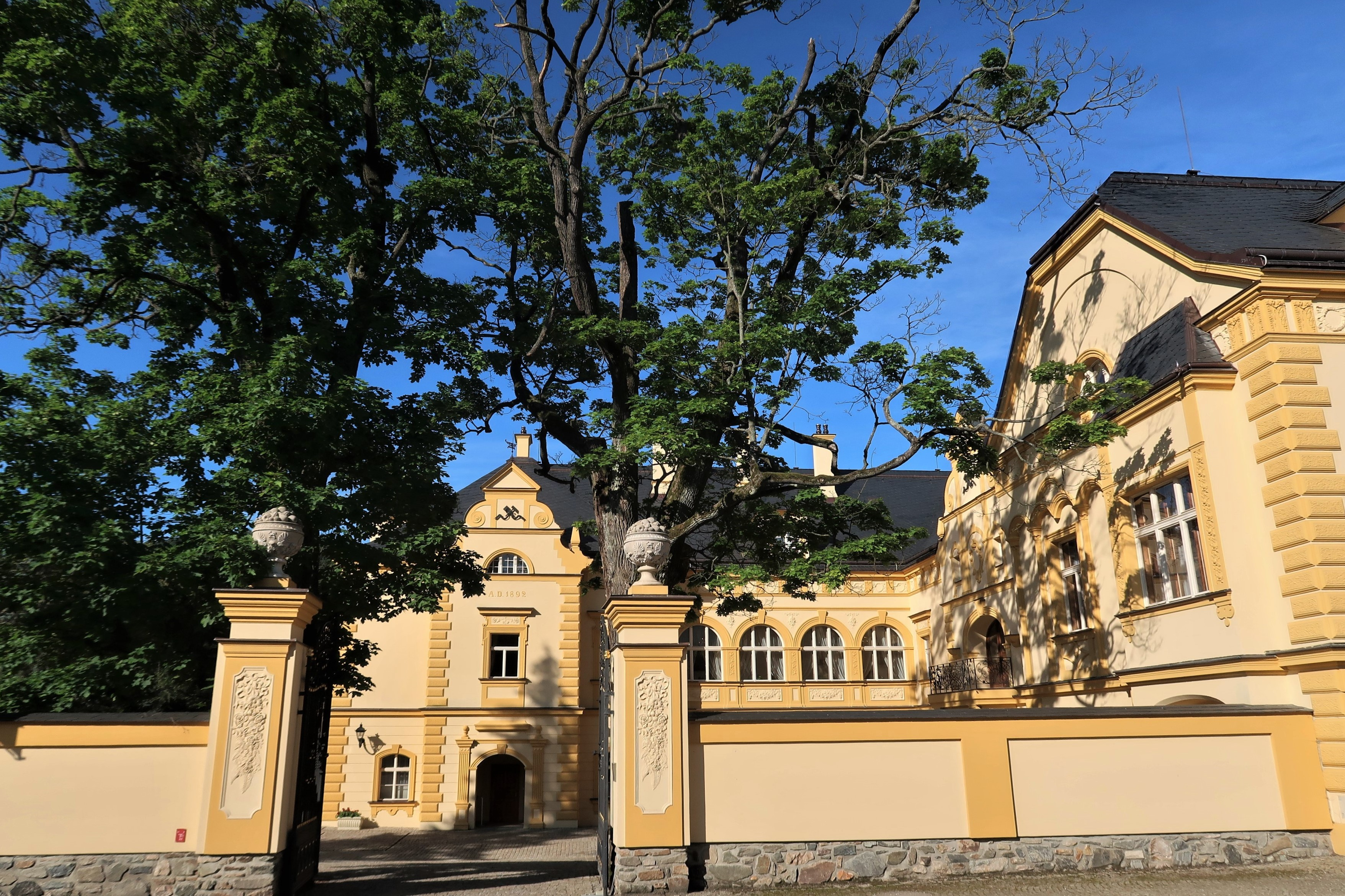 Hlavní vstup do zámku Sobotín